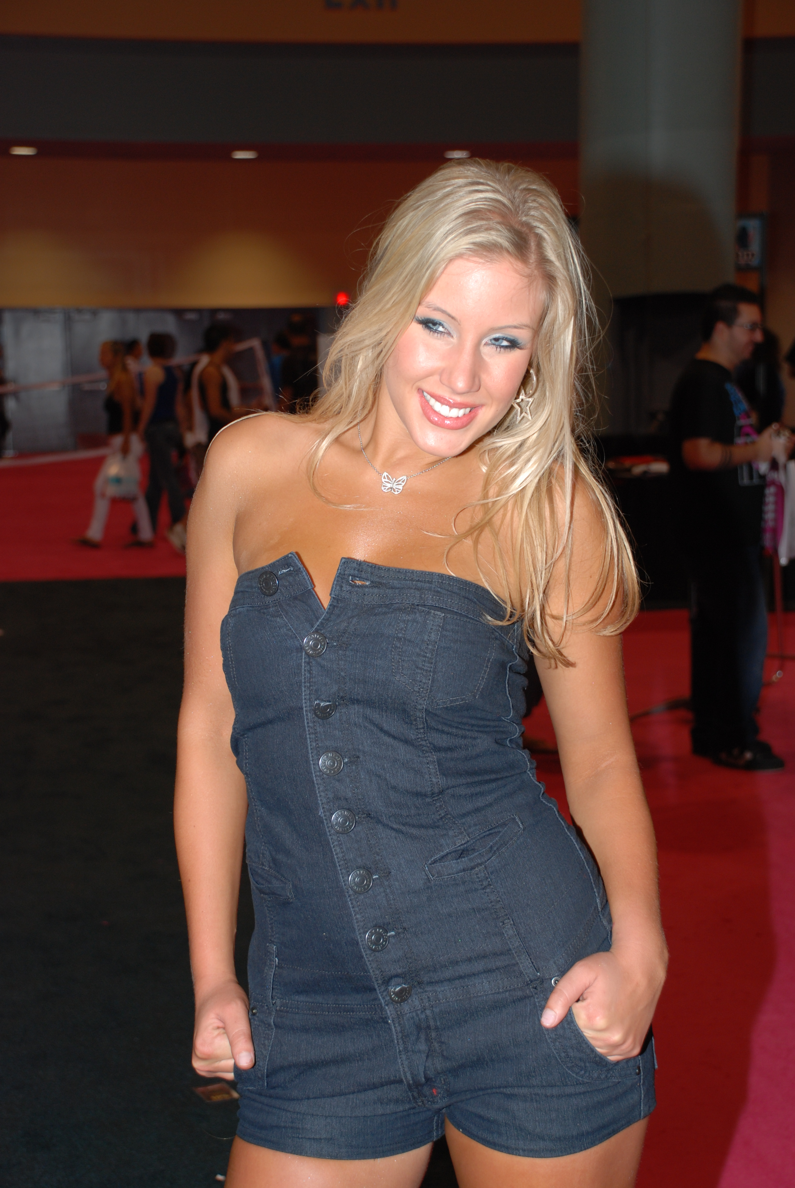 Miami Eroticaxxx 5-9-09 Nikon 070